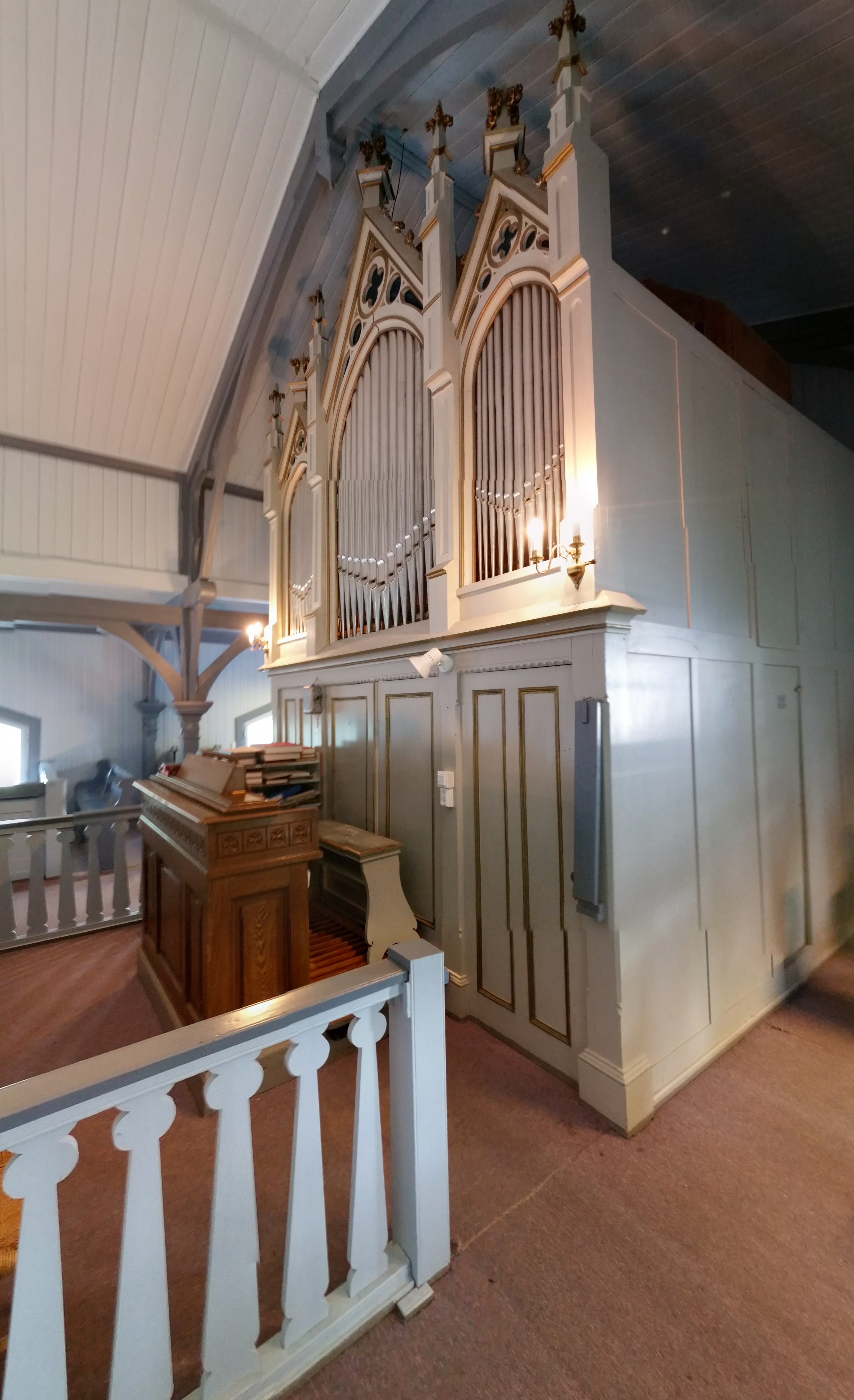 Orgel ble tatt i bruk 1. desember 1946, det var opprinnelig bygget til Melhus kirke i 1892 av firma August Nilsen.